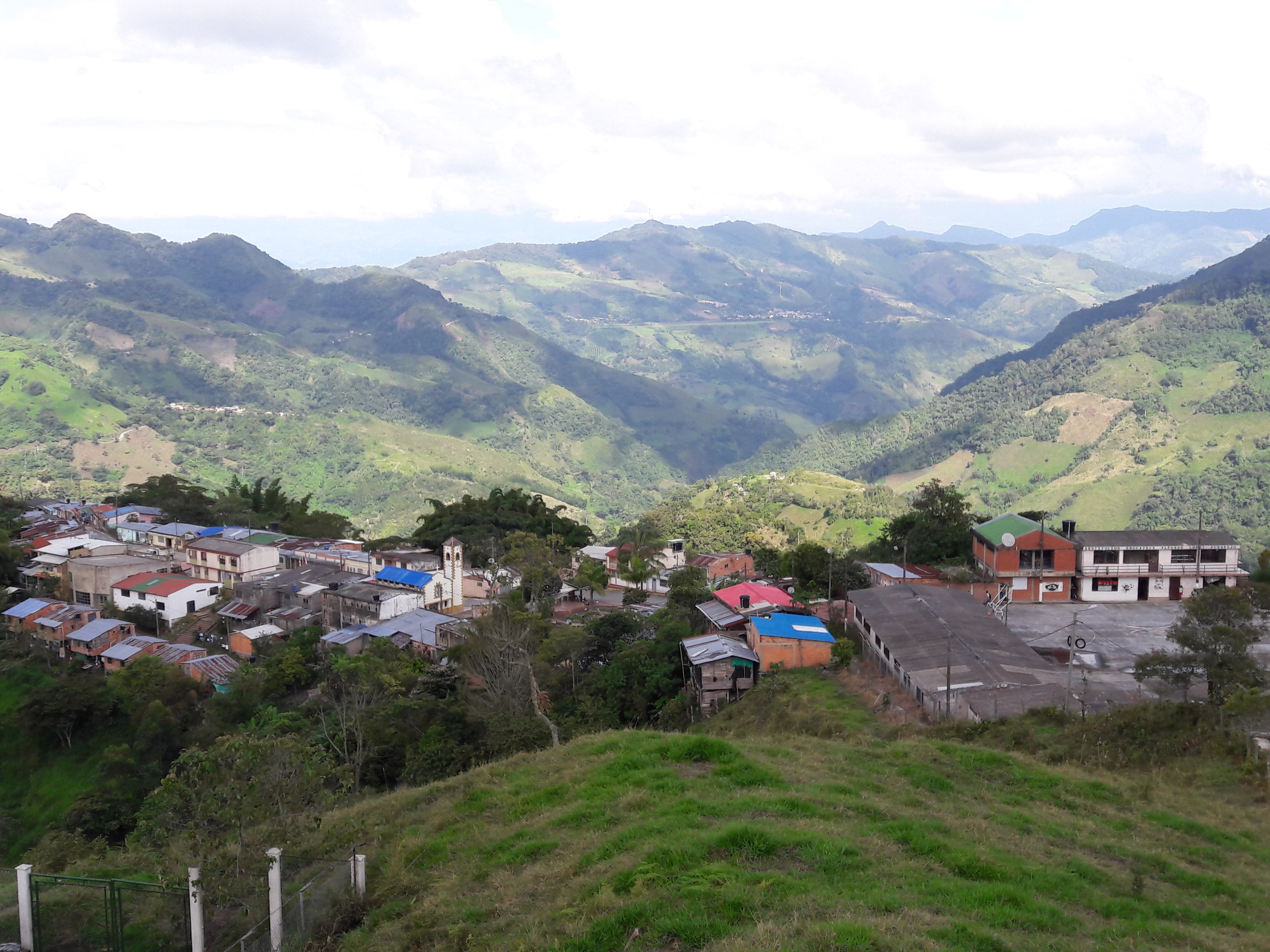 Poblado centro municipal de La Victoria Boyacá